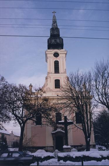 saját kép, Szent Anna Templom